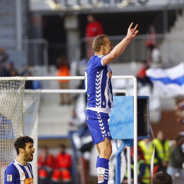 Jiří Jarošík gola ospatzen.(Alaves 2-1 Racing de Santander)